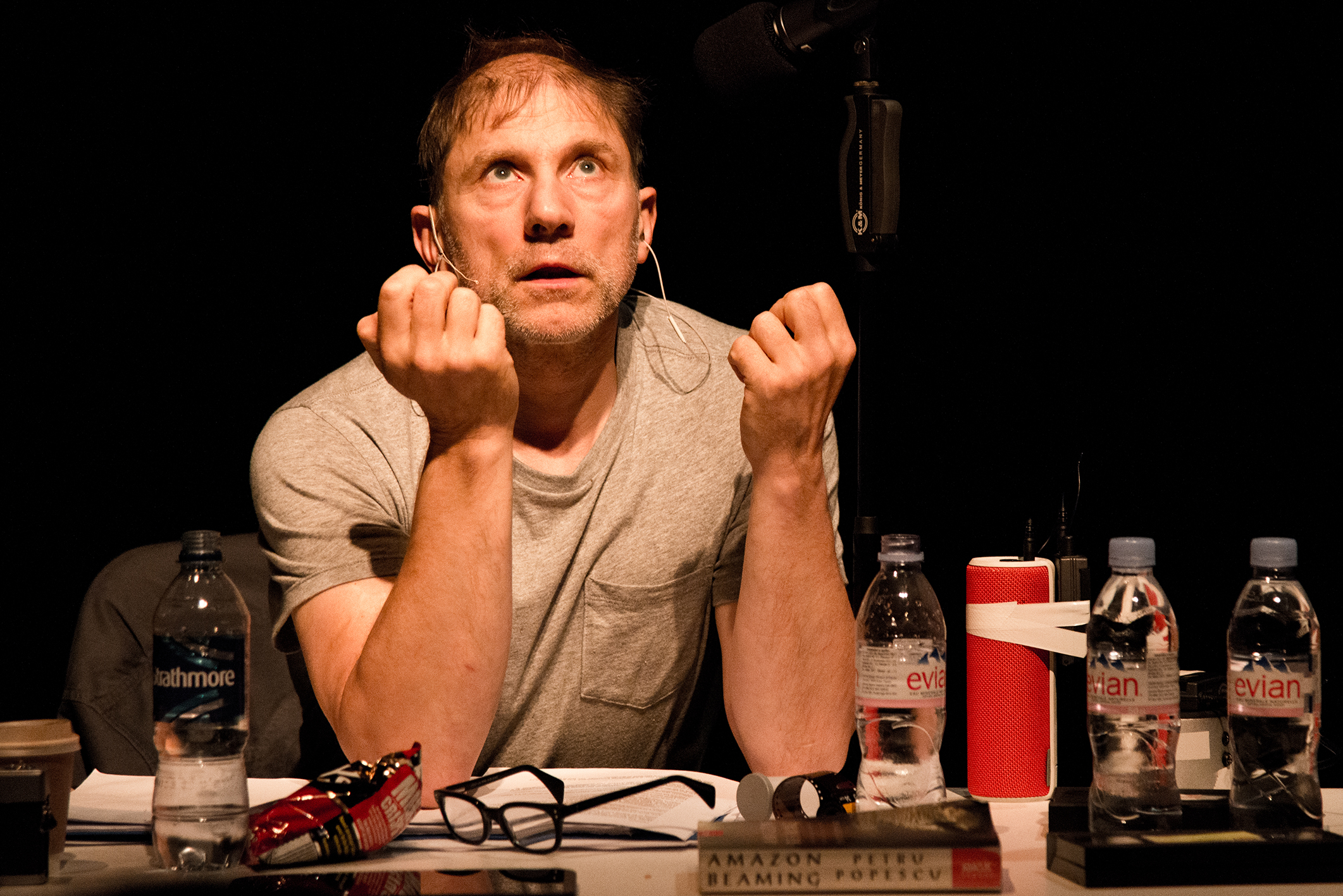 Simon McBurney in "The Encounter" (Théâtre de Complicité), World Premiere at the Edinburgh International Festival, August 2015